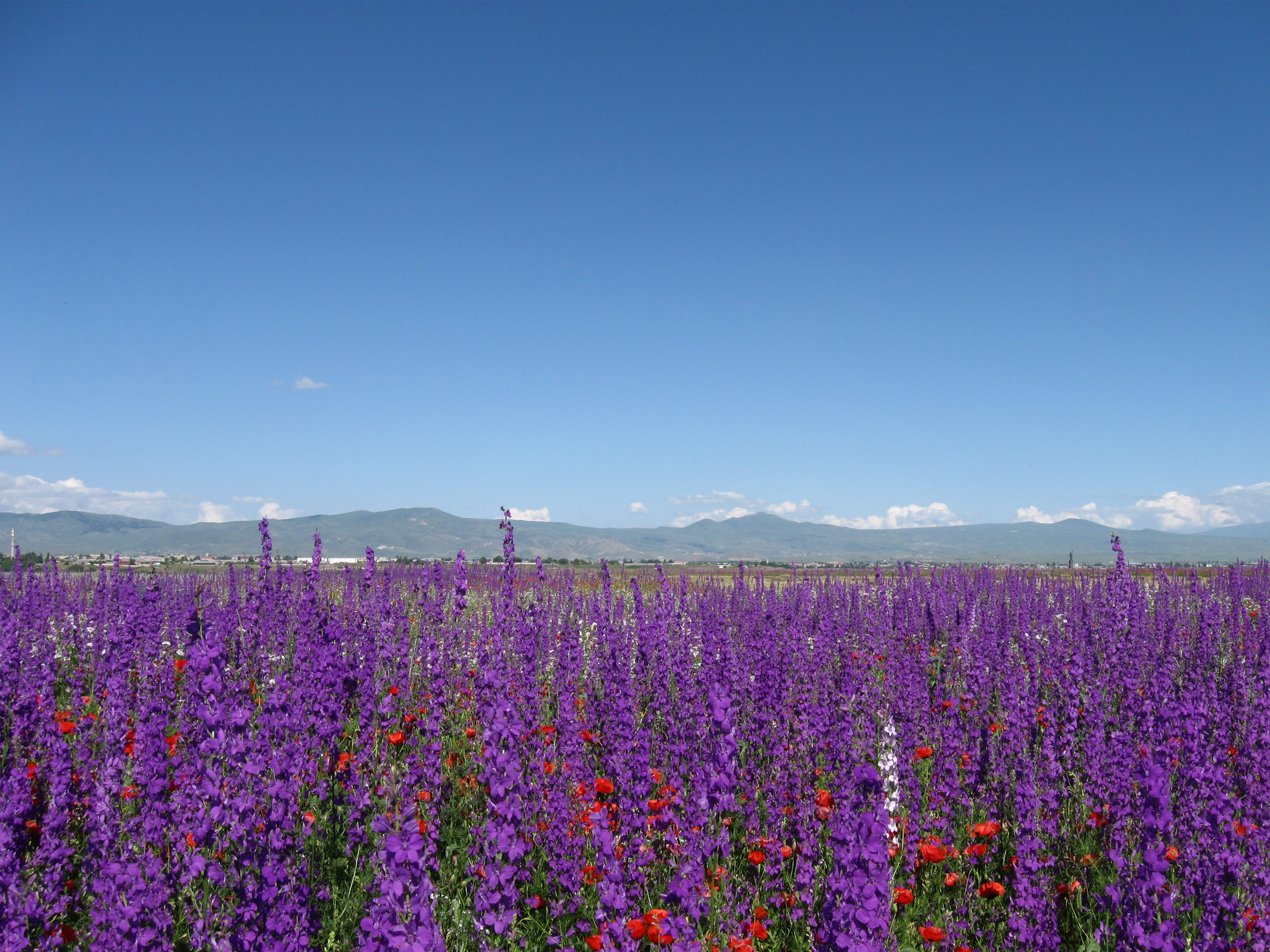 Շիրակի դաշտը հունիսի վերջին